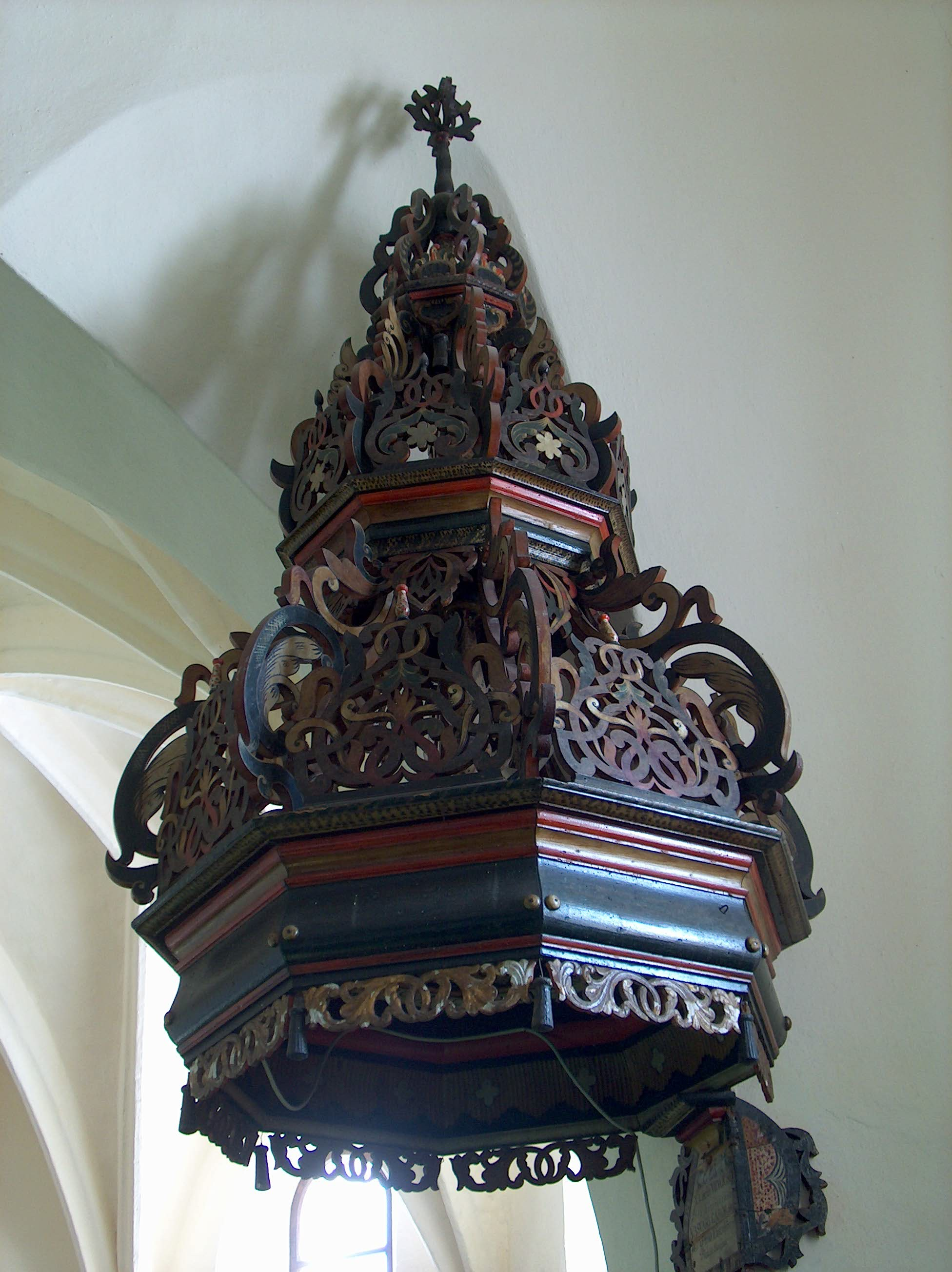 Vámosoroszi Református Templom - hangvető